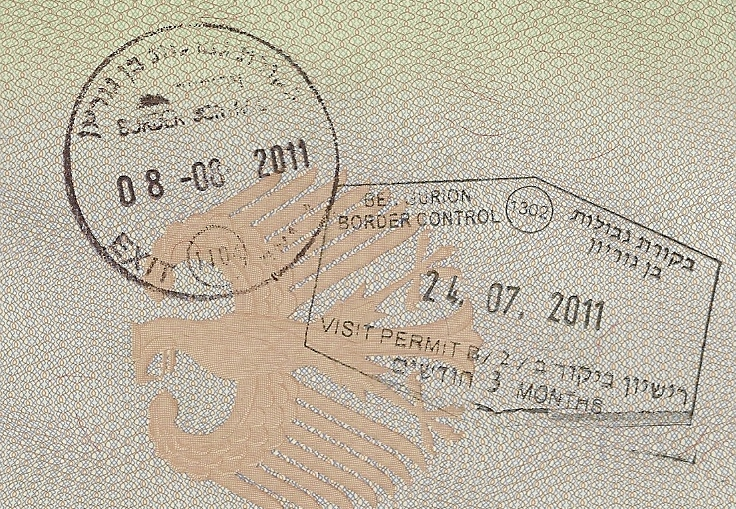 Israel — Visum (3 Monate), links: Ausreisestempeleindruck; rechts: Einreisestempelabdruck; jeweils Flughafen Ben Gurion.